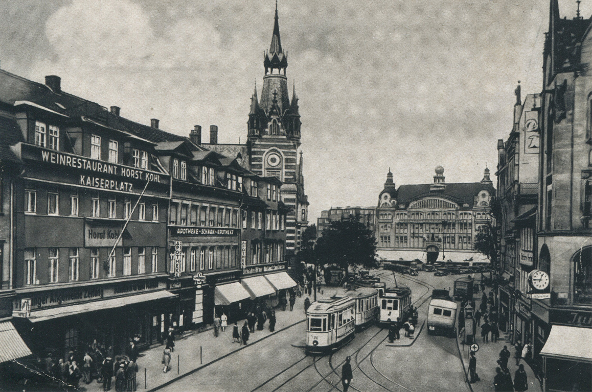 Kaufhaus Römischer Kaiser, am Anger in Erfurt